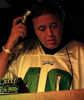 O DJ brasileiro Marlboro apresentando-se em Brasília